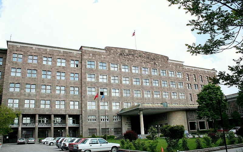 Dil ve Tarih Coğrafya Fakültesi